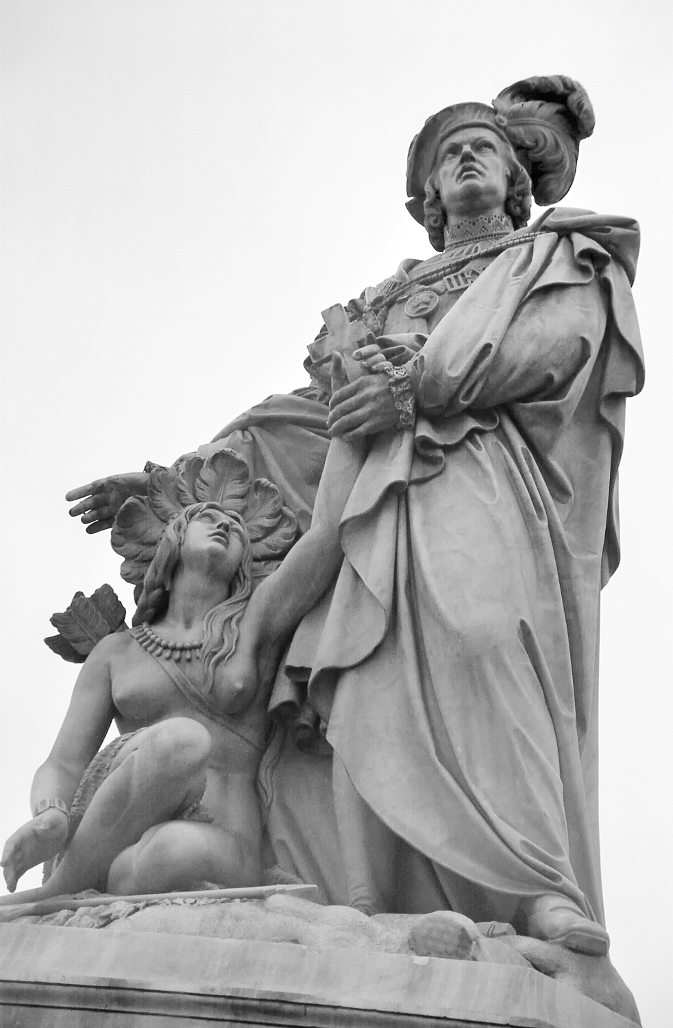 Estatua de Paseo Colon, Lima, Peru